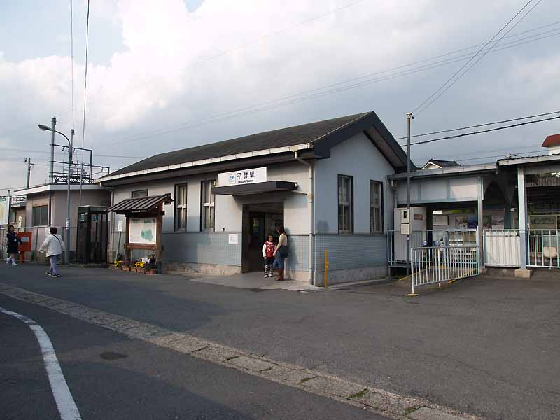 Kinki Nippon Railway Co.(Kintetsu) Heguri Station（近鉄生駒線平群駅）